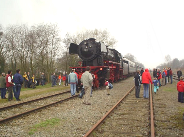 Een druk bezocht emplacement Veghel tijdens de afscheidsritten op het Duits Lijntje. De foto is door mij zelf gemaakt.